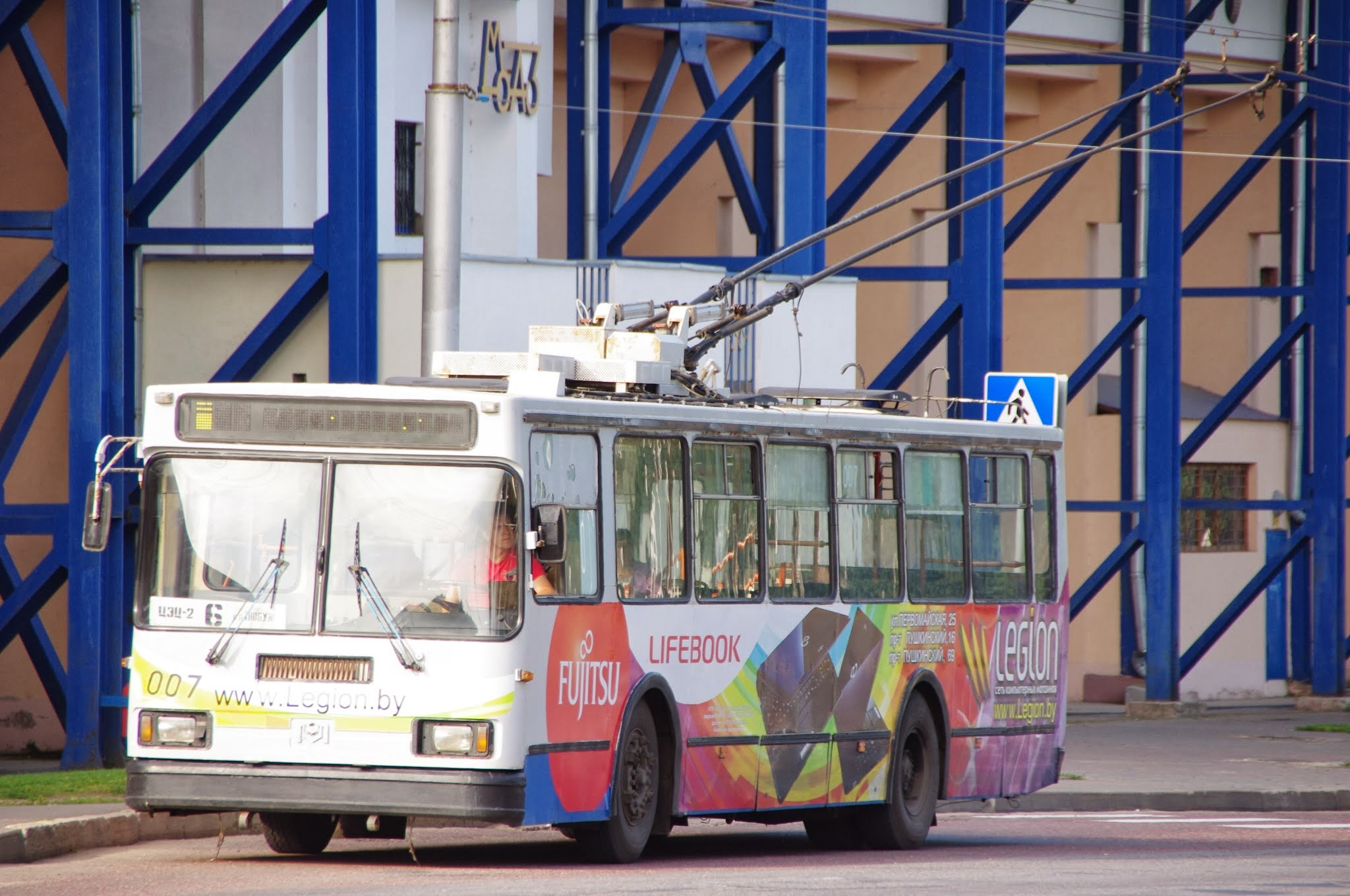 Кiрава, Магілёў, Belarus